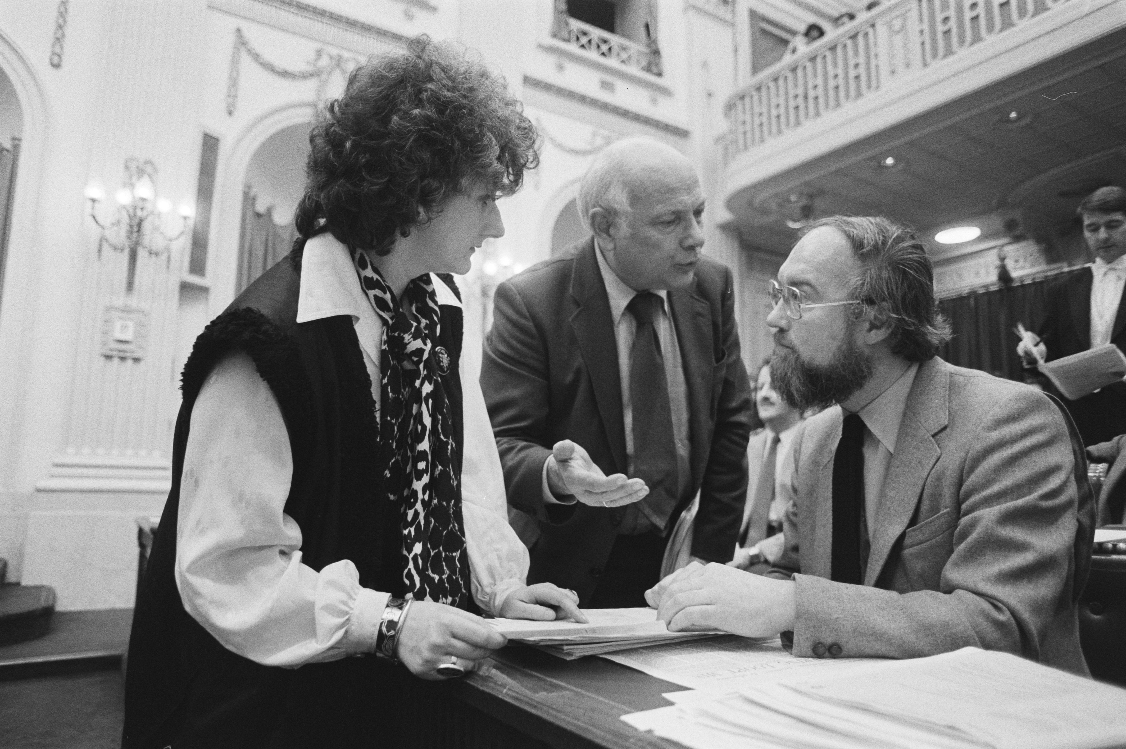 Collectie / Archief : Fotocollectie Anefo Reportage / Serie : [ onbekend ] Beschrijving : V.l.n.r. Wijnie Jabaaij, Joop den Uijl en van David van Ooijen in de Tweede Kamer bij de stemming over diverse moties omtrent de zigeunerkwestie Datum : 27 januari 1981 Locatie : Binnenhof, Den Haag, Zuid-Holland Trefwoorden : parlementariërs, vergaderingen Persoonsnaam : Jabaaij, Wijnie, Ooijen, D.A.Th. van, Uyl, Joop den Fotograaf : Dijk, Hans van / Anefo, [onbekend] Auteursrechthebbende : Nationaal Archief Materiaalsoort : Negatief (zwart/wit) Nummer archiefinventaris : bekijk toegang 2.24.01.05 Bestanddeelnummer : 931-2866